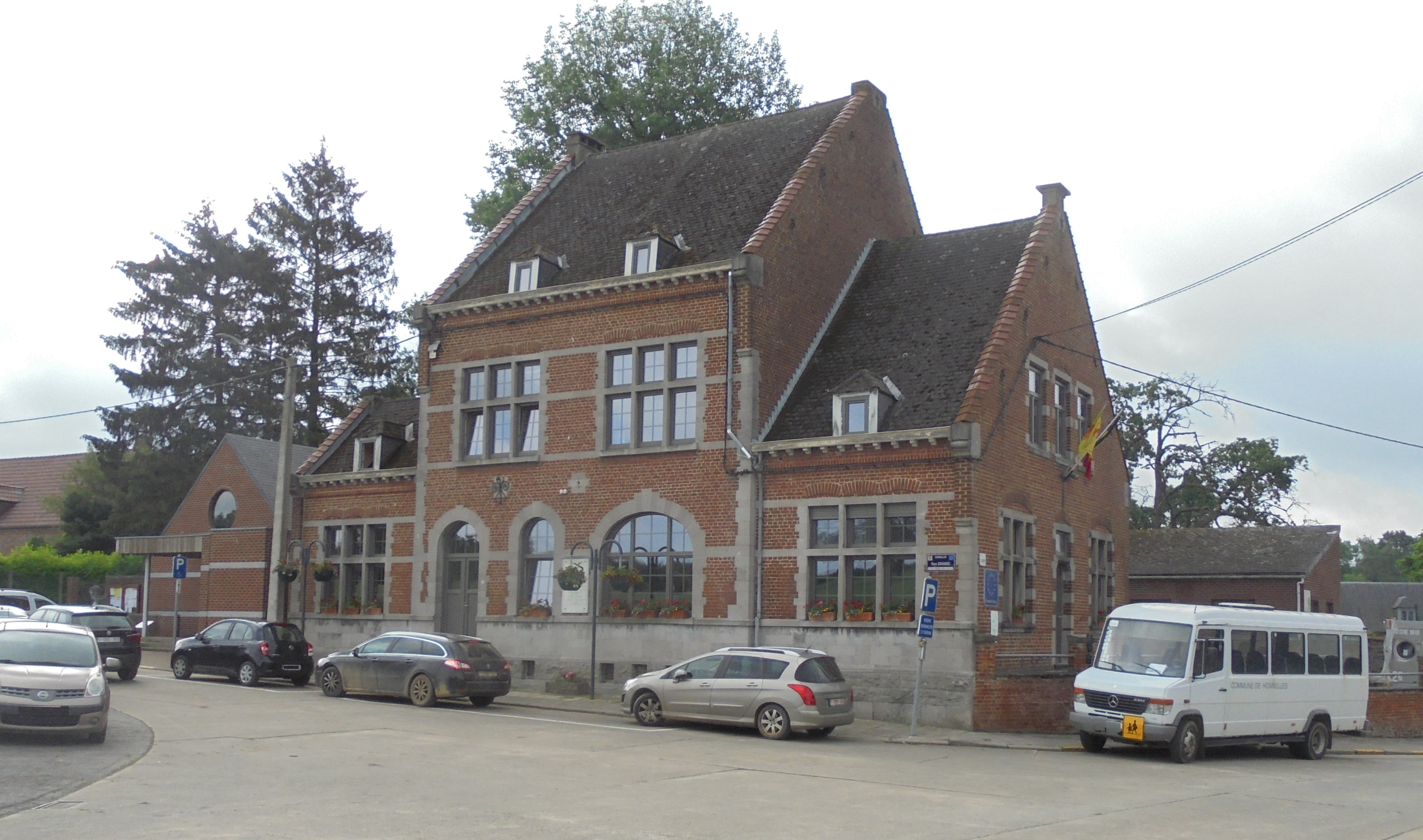 Gemeentehuis van Honnelles - rue Grande - Autreppe - Honnelles - Henegouwen - België